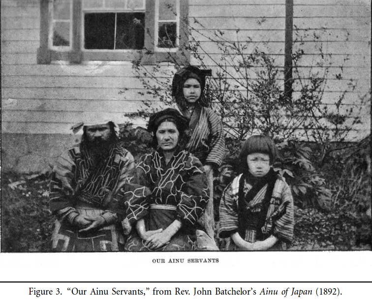 Les serviteurs Aïnous de la famille du révérend John Batchelor en 1892.